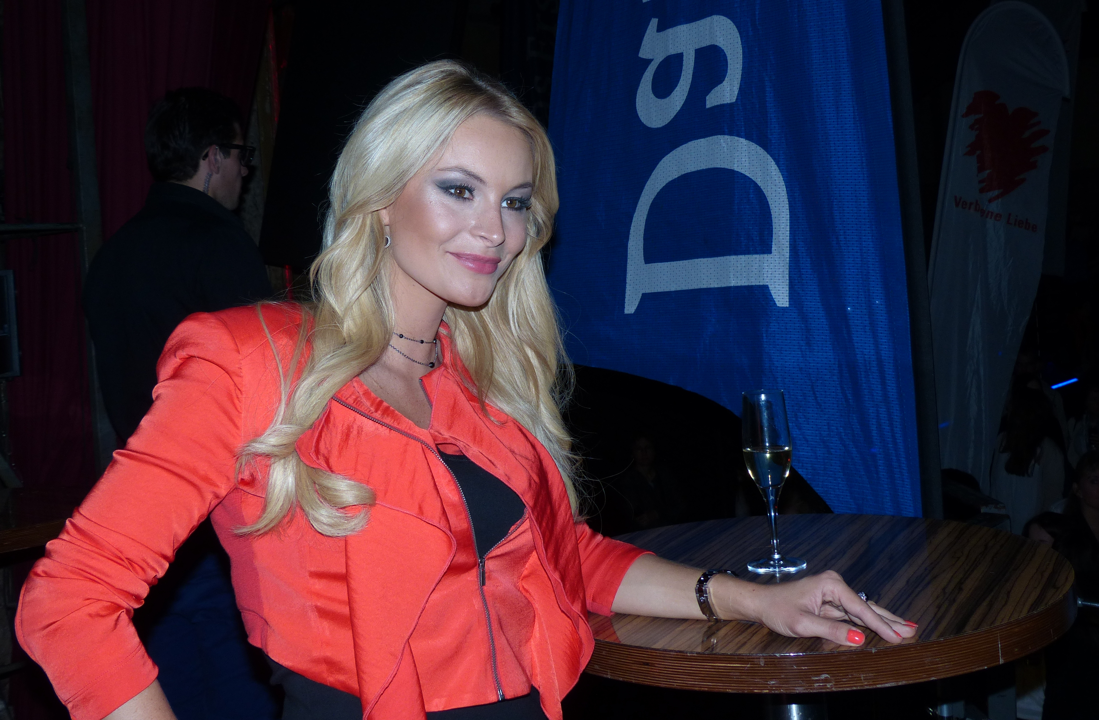 Jana Julie Kilka, 18. Jahre Verbotene Liebe Party, Düsseldorf